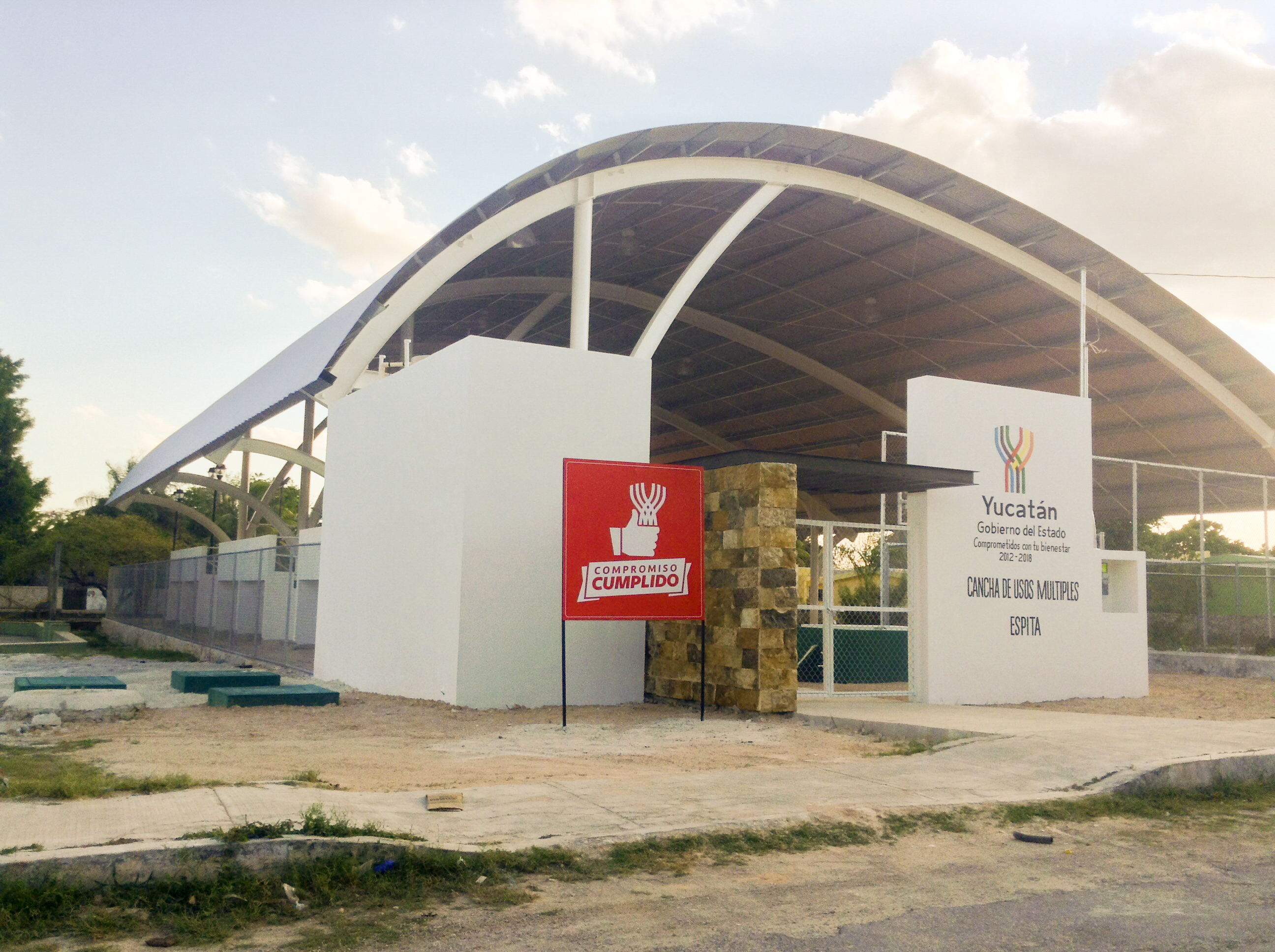 Cancha de baloncesto en Espita.